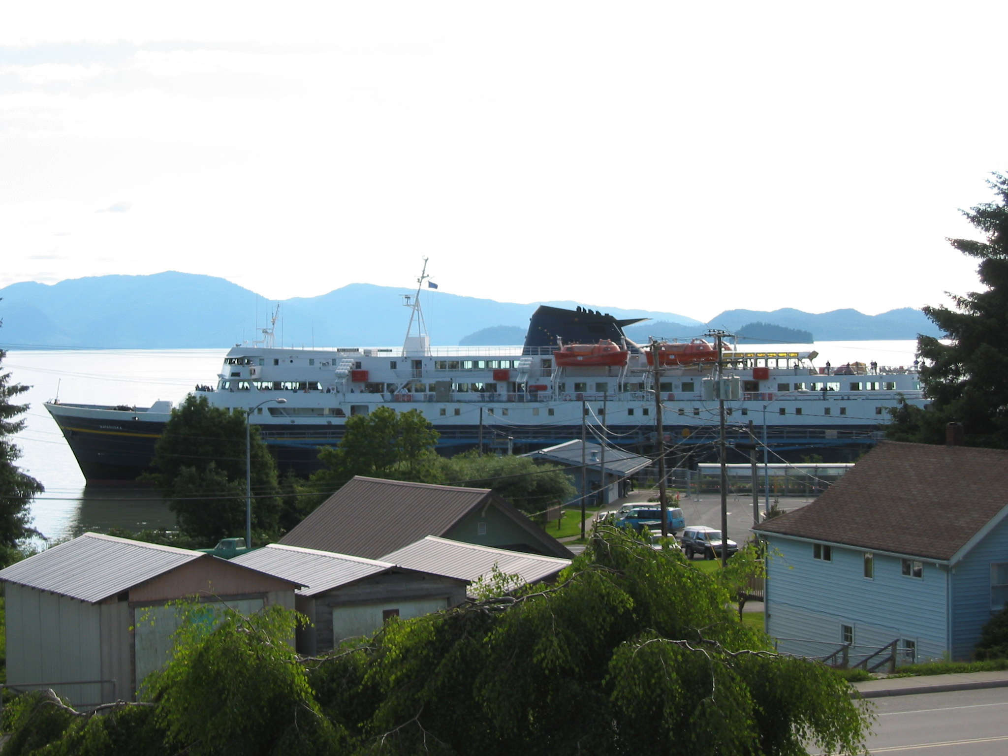 Alaska State Ferry M/V Matanuska departing Wrangell, Alaska. IMO Number: 5228827 MMSI Number: 338195000 Callsign: WN4201 Length: 124 m Beam: 22 m